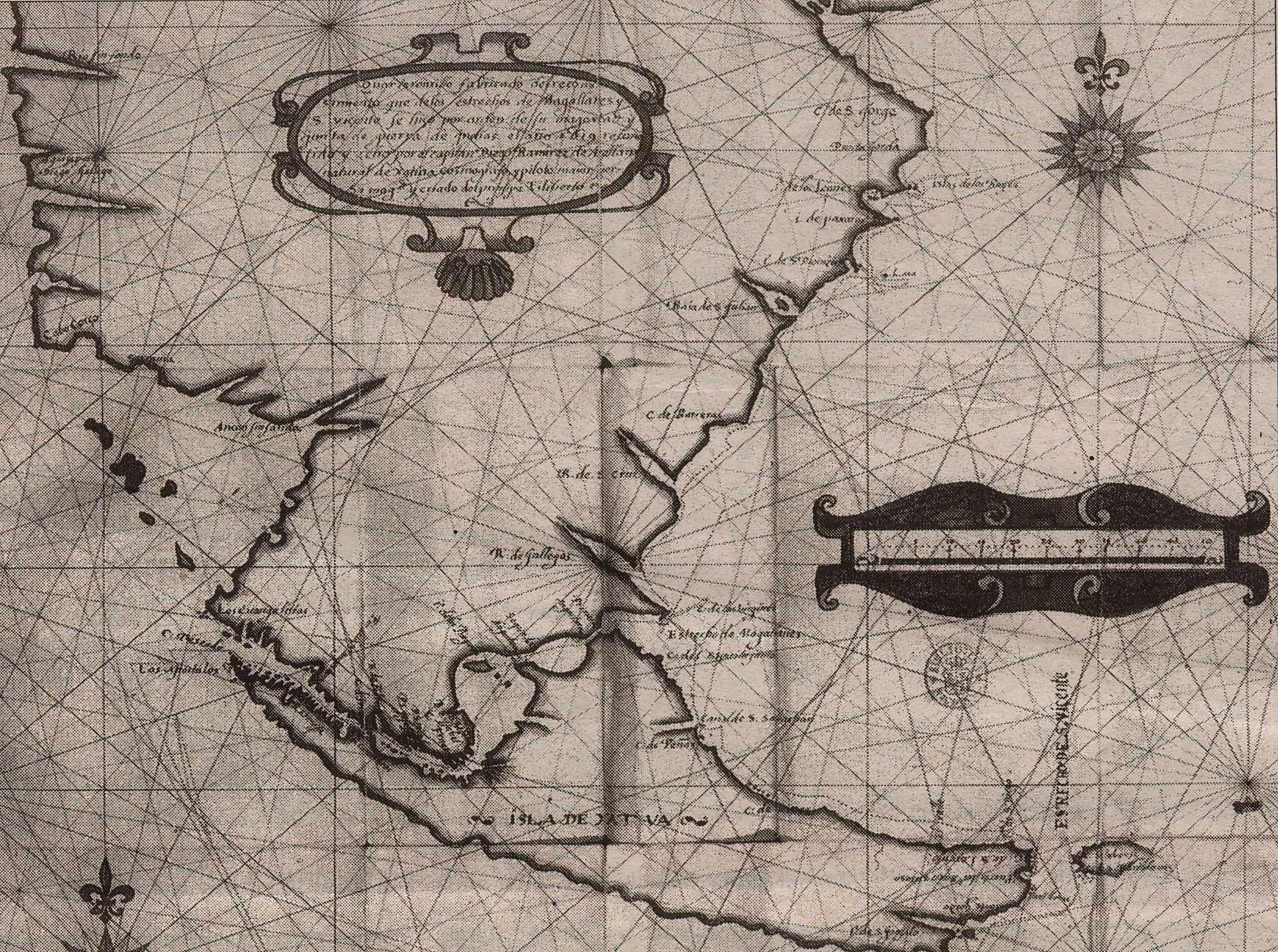 Mapa de Diego Ramírez de Arellano amb l'Illa de Xàtiva i part de la Patagònia.